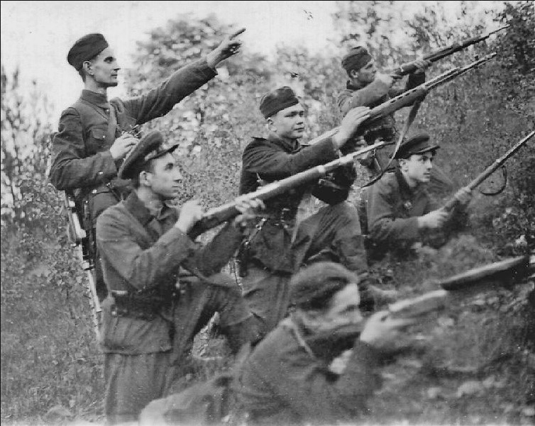 Невідомий повстанський відділ. Рівненщина, орієнтовно 1947 р.